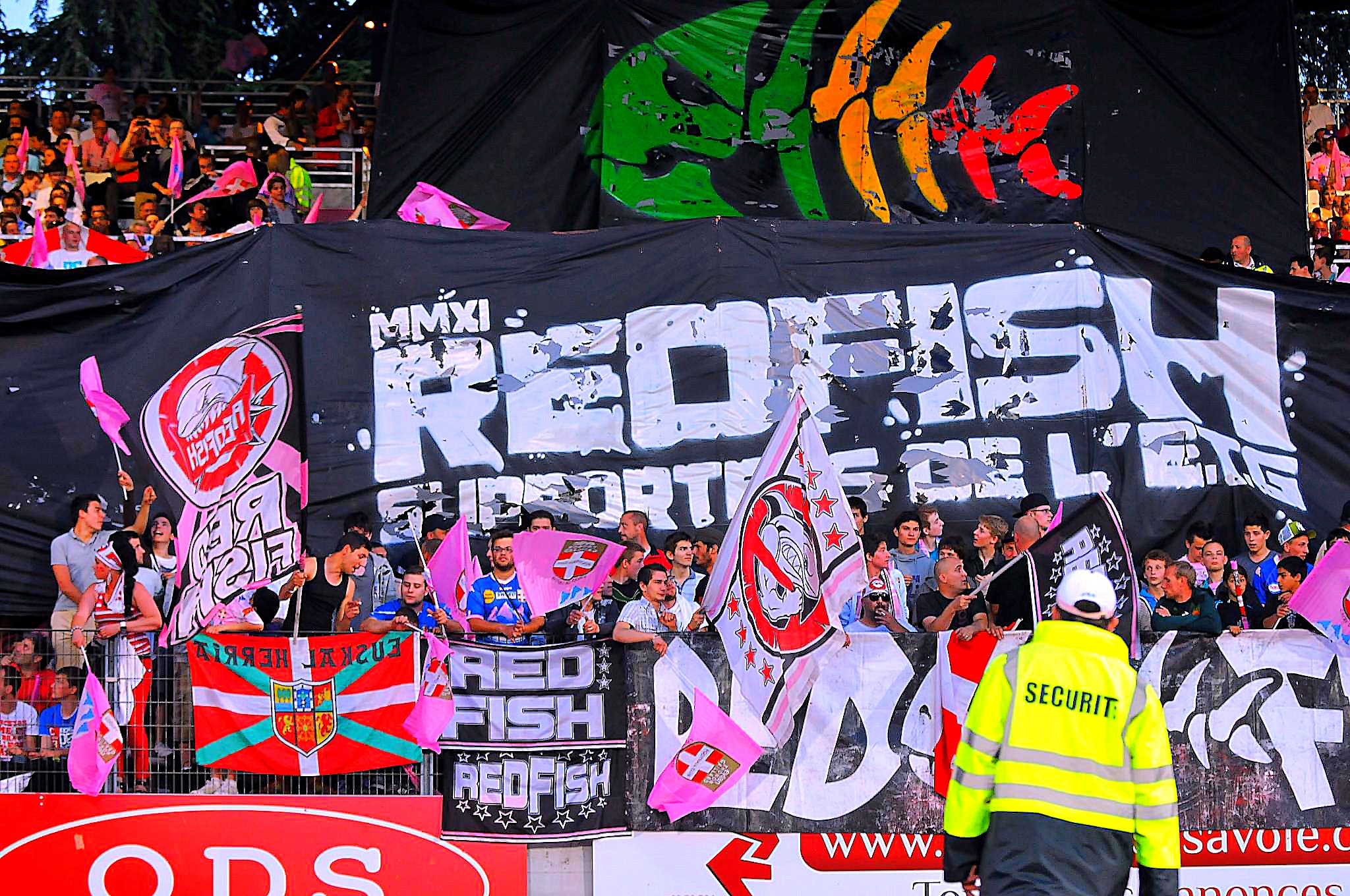 Tifo des Red Fish.